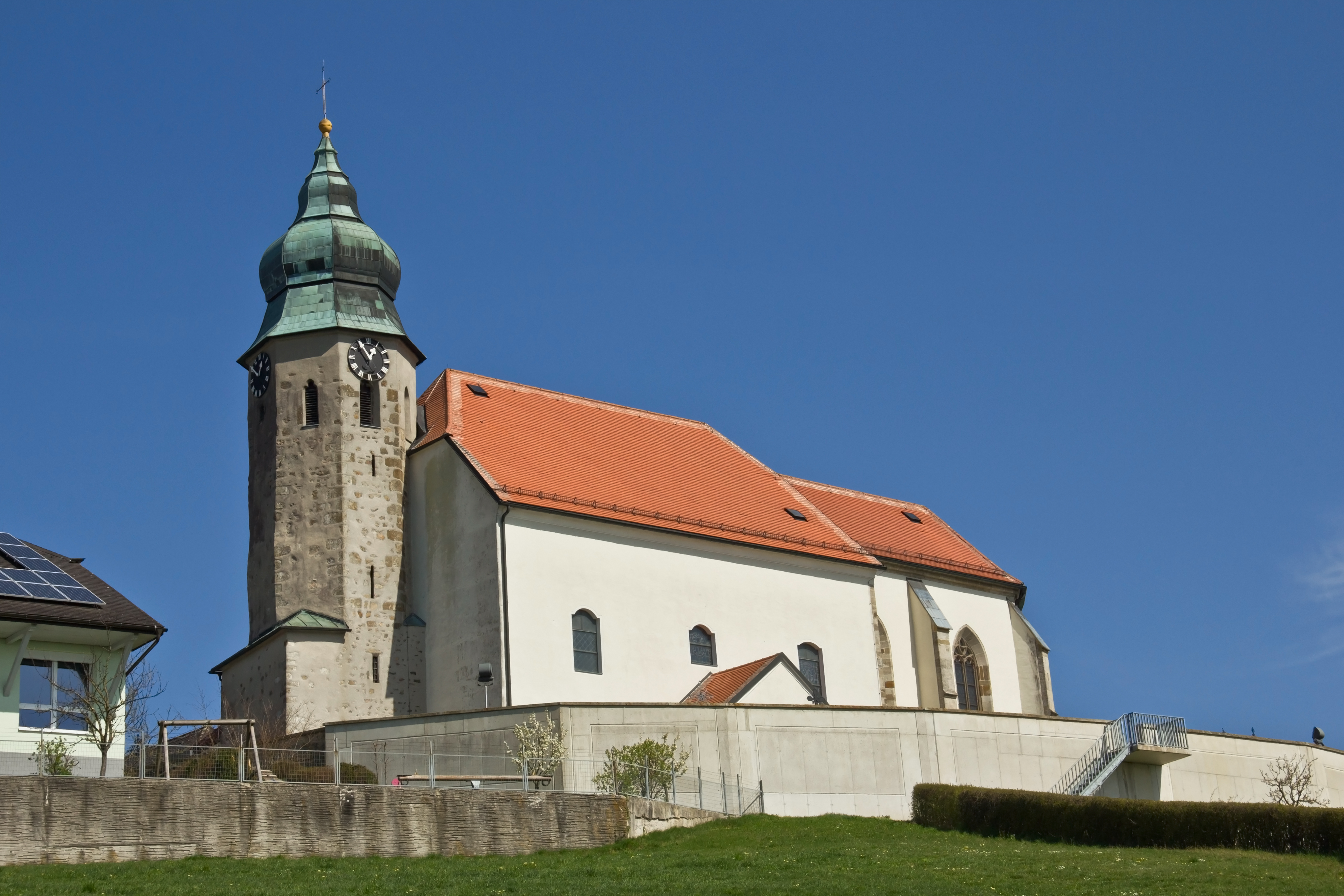 Kath. Pfarrkirche, Wallfahrtskirche hl. Ottilie in Kollmitzberg